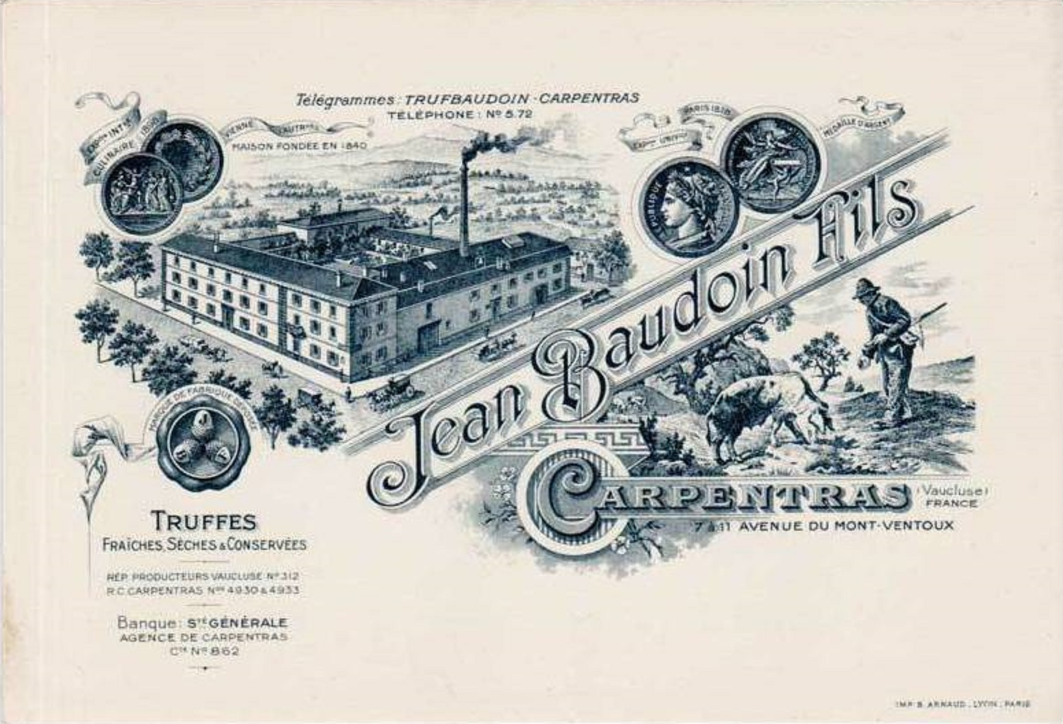 Jean Baudoin de Carpentras, truffes du Mont-Ventoux